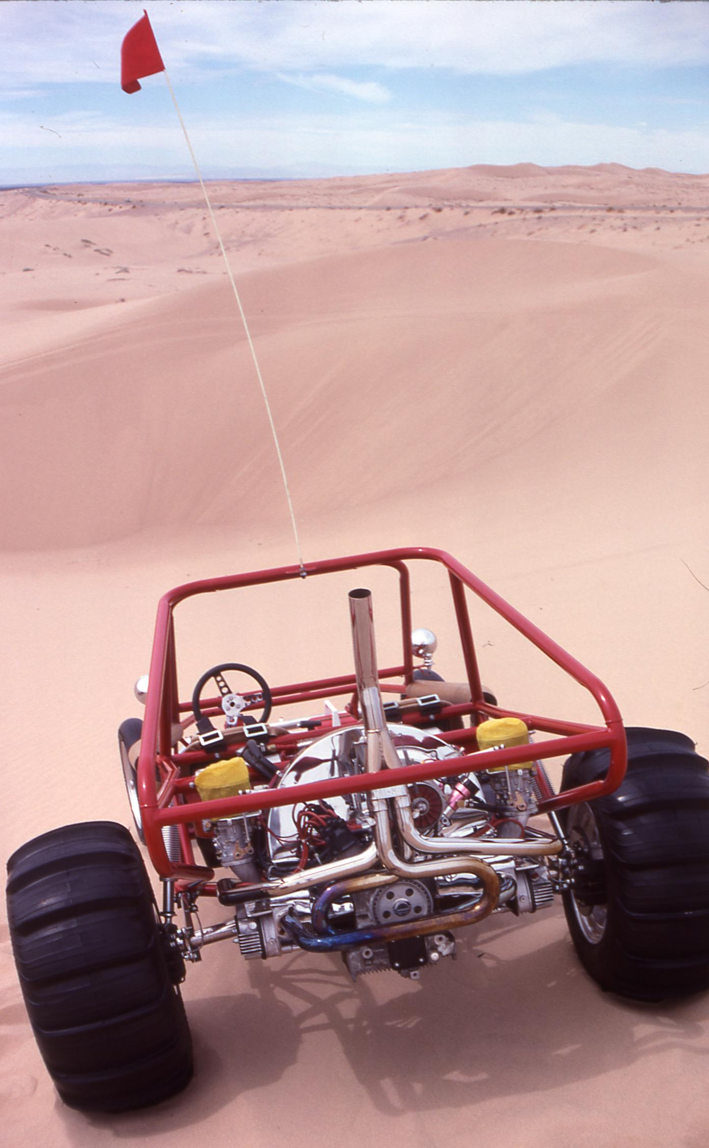 Blick über die Algodones-Dünen bei Glamis (Kalifornien). Im Vordergrund Dünenbuggy mit 150 PS-VW-Motor.